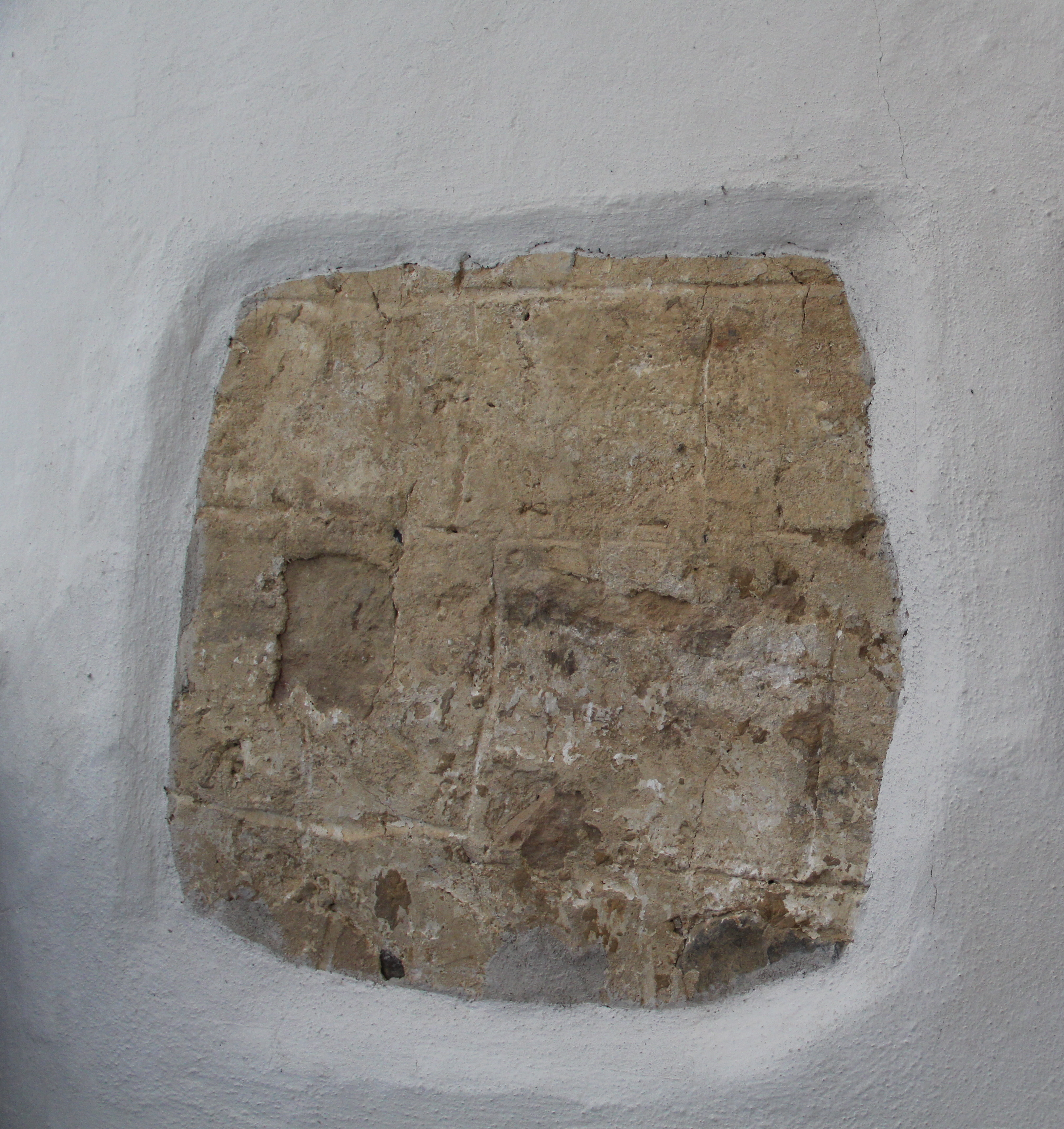 Quaderverputz der Mainzlarer Kirche, Staufenberg, Kreis Gießen, Hessen, Deutschland